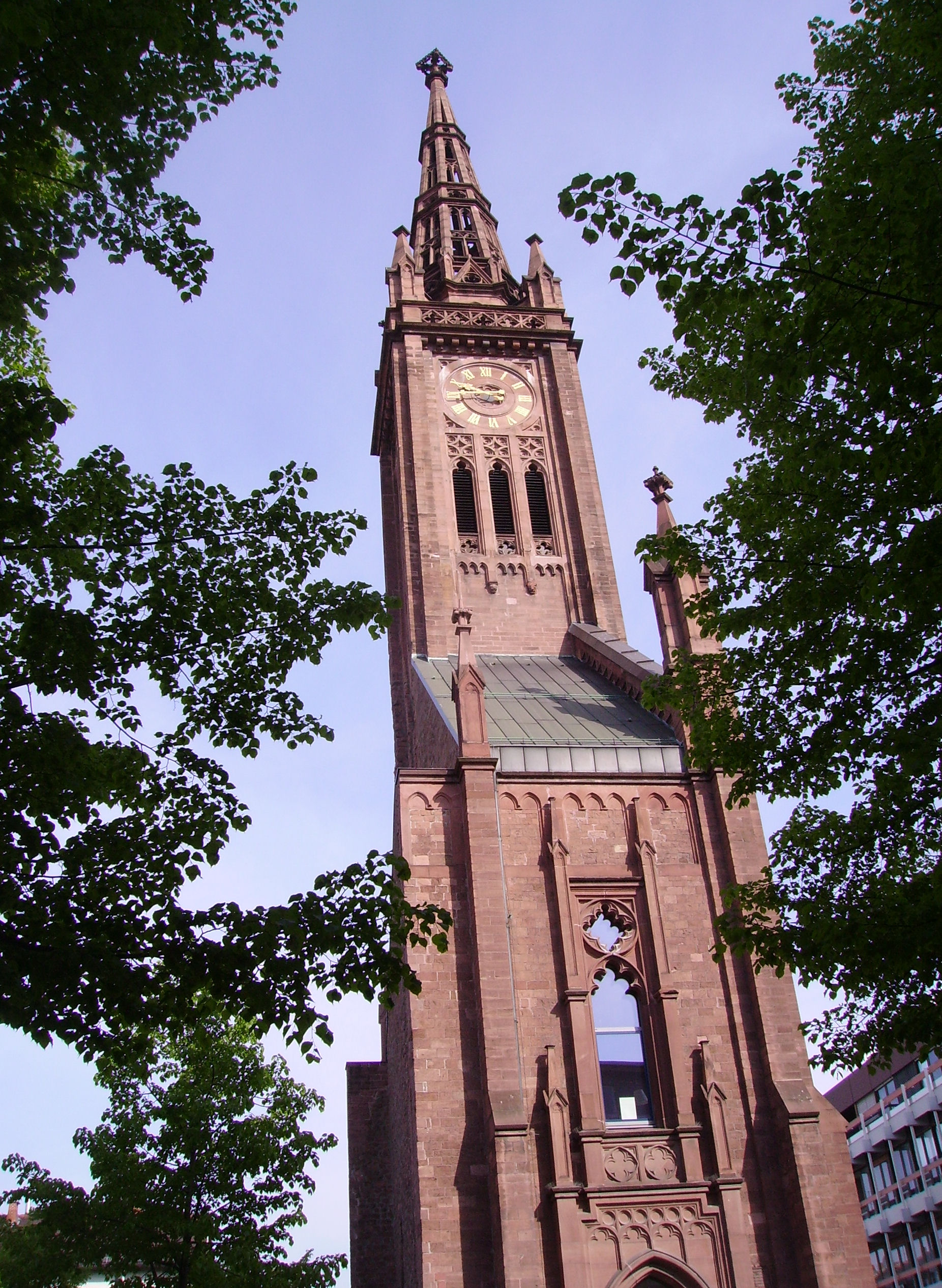 church in Ludwigshafen in Rhineland-Palatinate, Germany